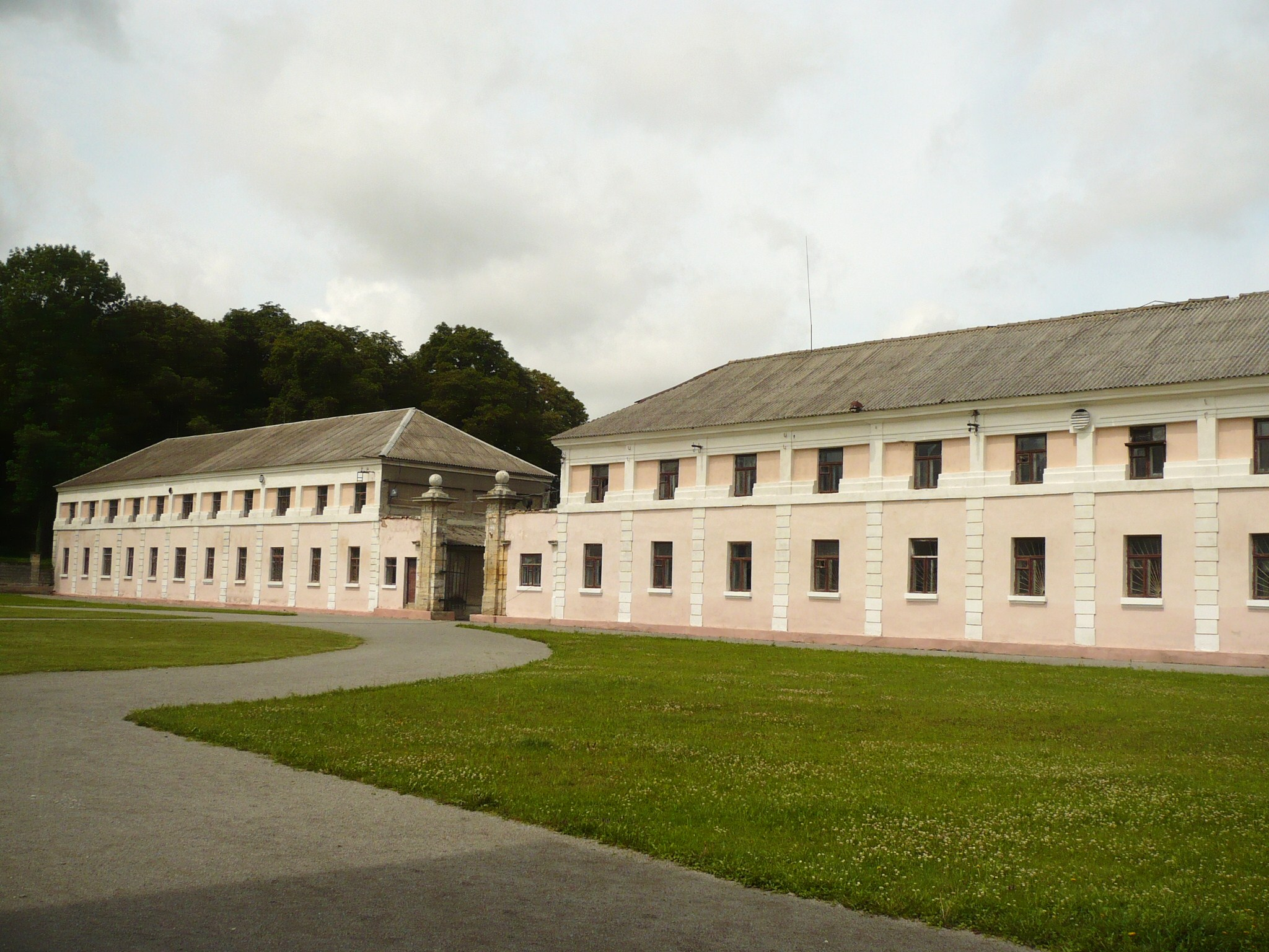 Wiśniowiec, budynki przy pałacu